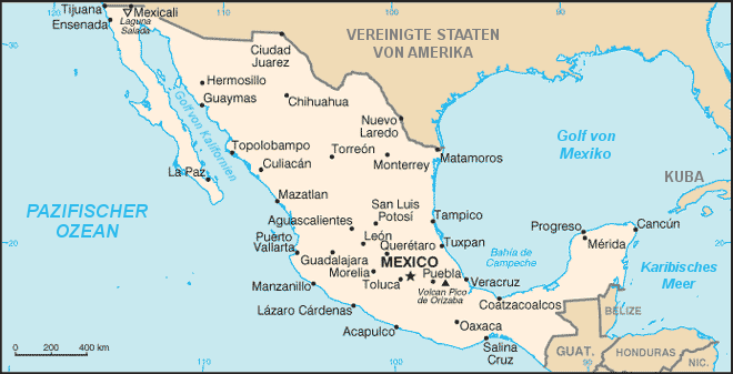 Karte von Mexiko